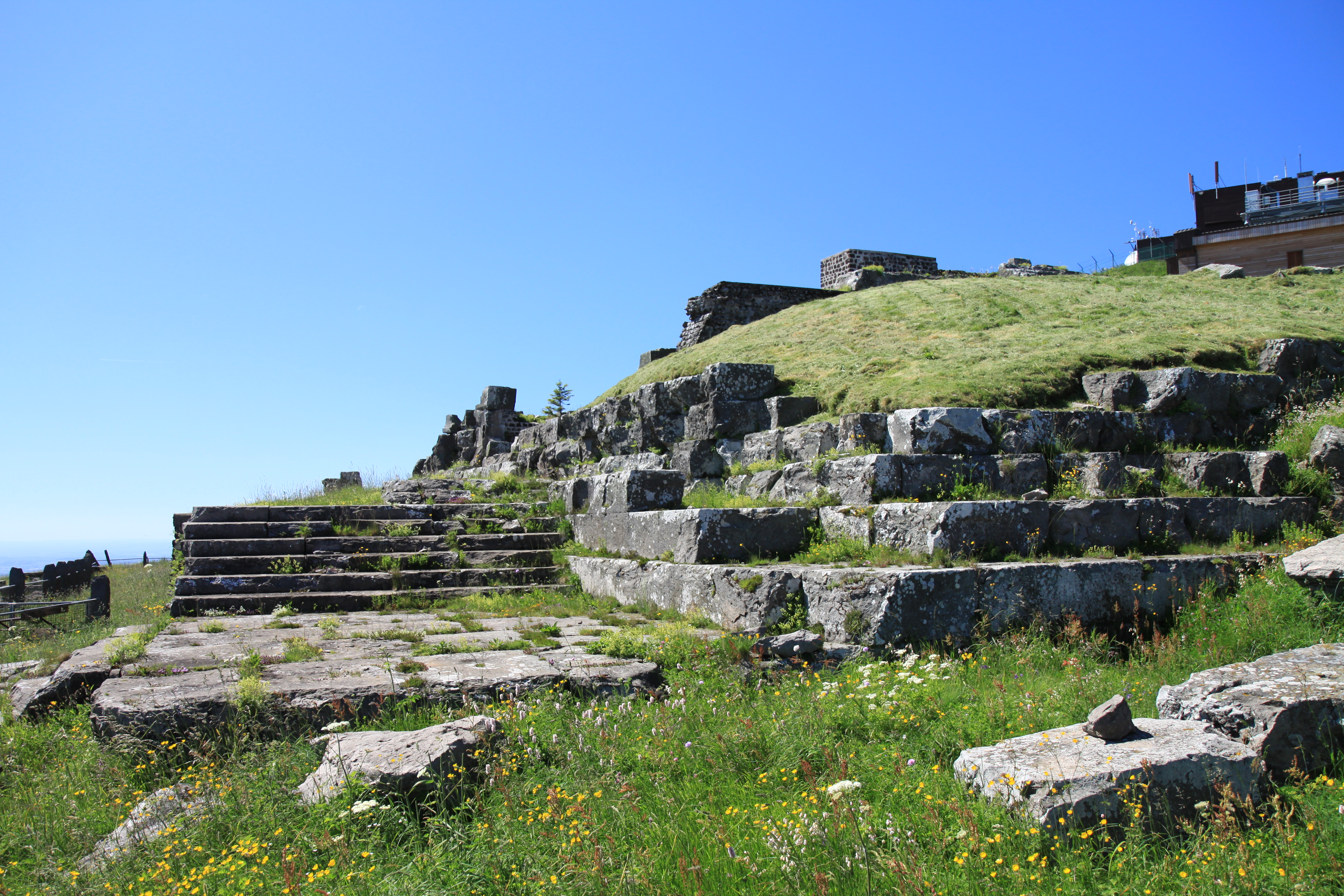 Le temple de Mercure au sommet du Puy de Dôme.